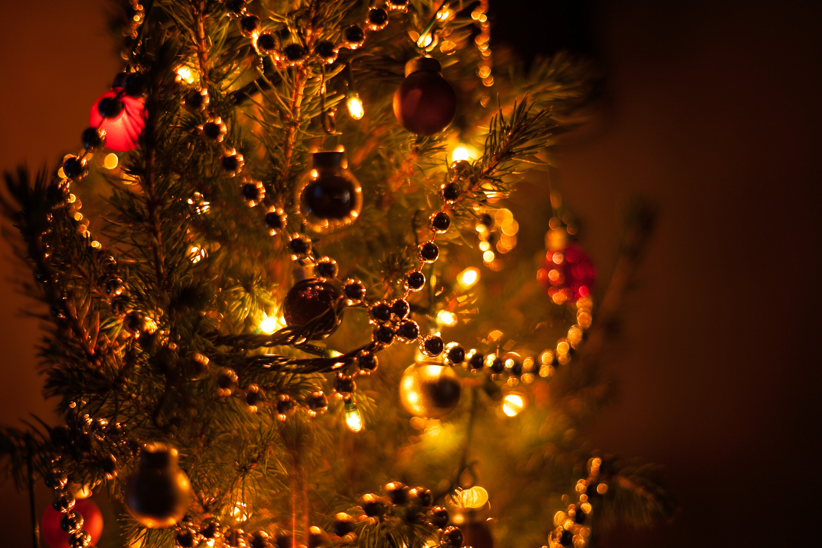 Новогодняя ёлка (фрагмент).